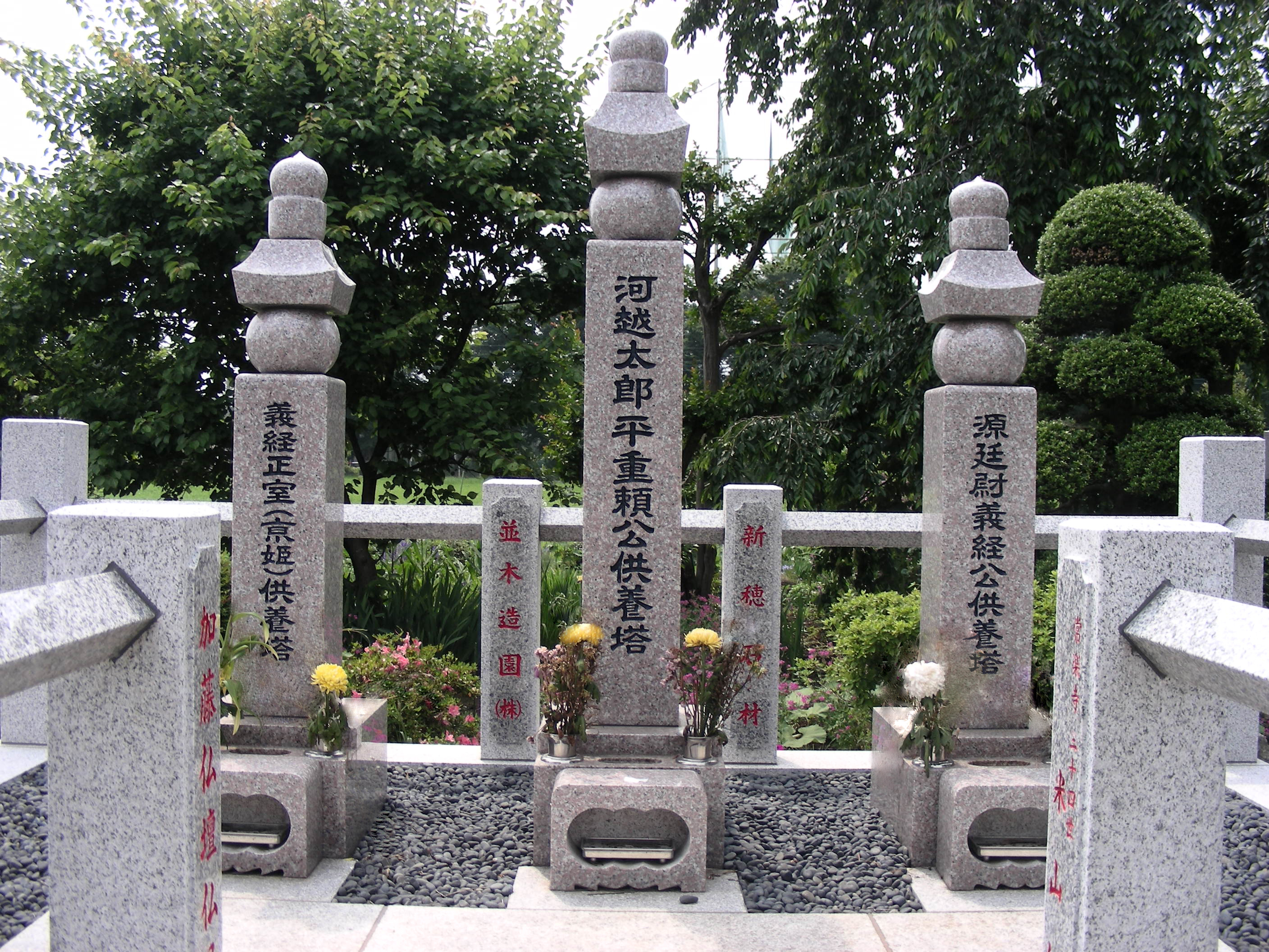 埼玉県川越市上戸の河越館跡に建つ河越重頼・京姫・源義経の供養塔。2008年6月上旬撮影